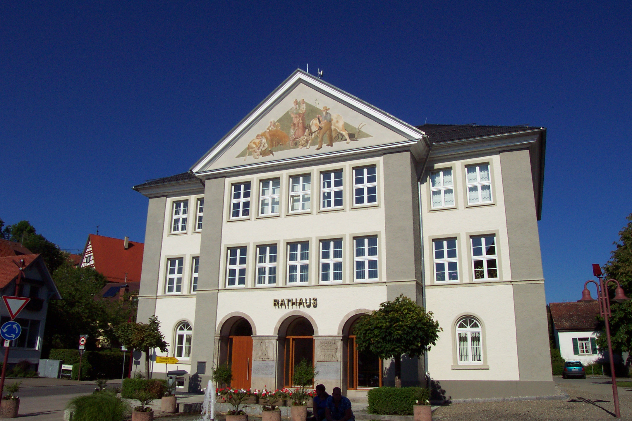 Rathaus von Krauchenwies